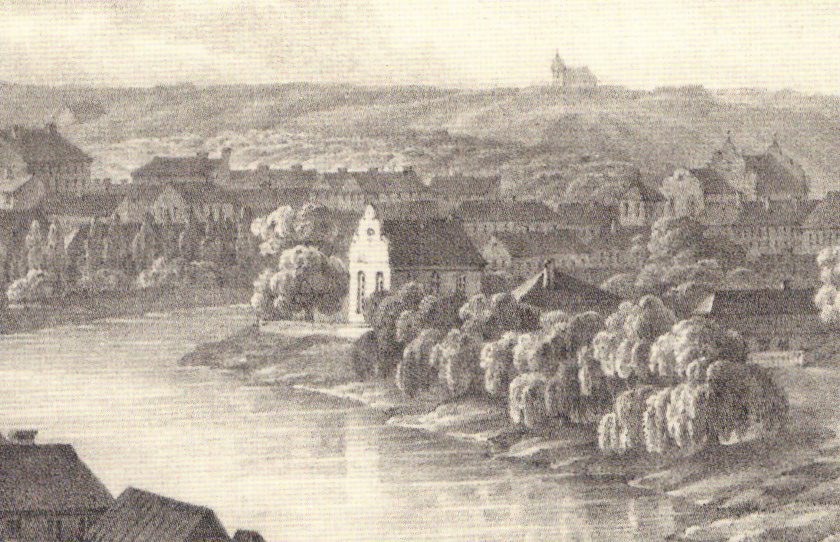 Litografijos "Vilniaus vaizdas nuo Tivolio parko kalvos Antakalnyje" fragmentas.